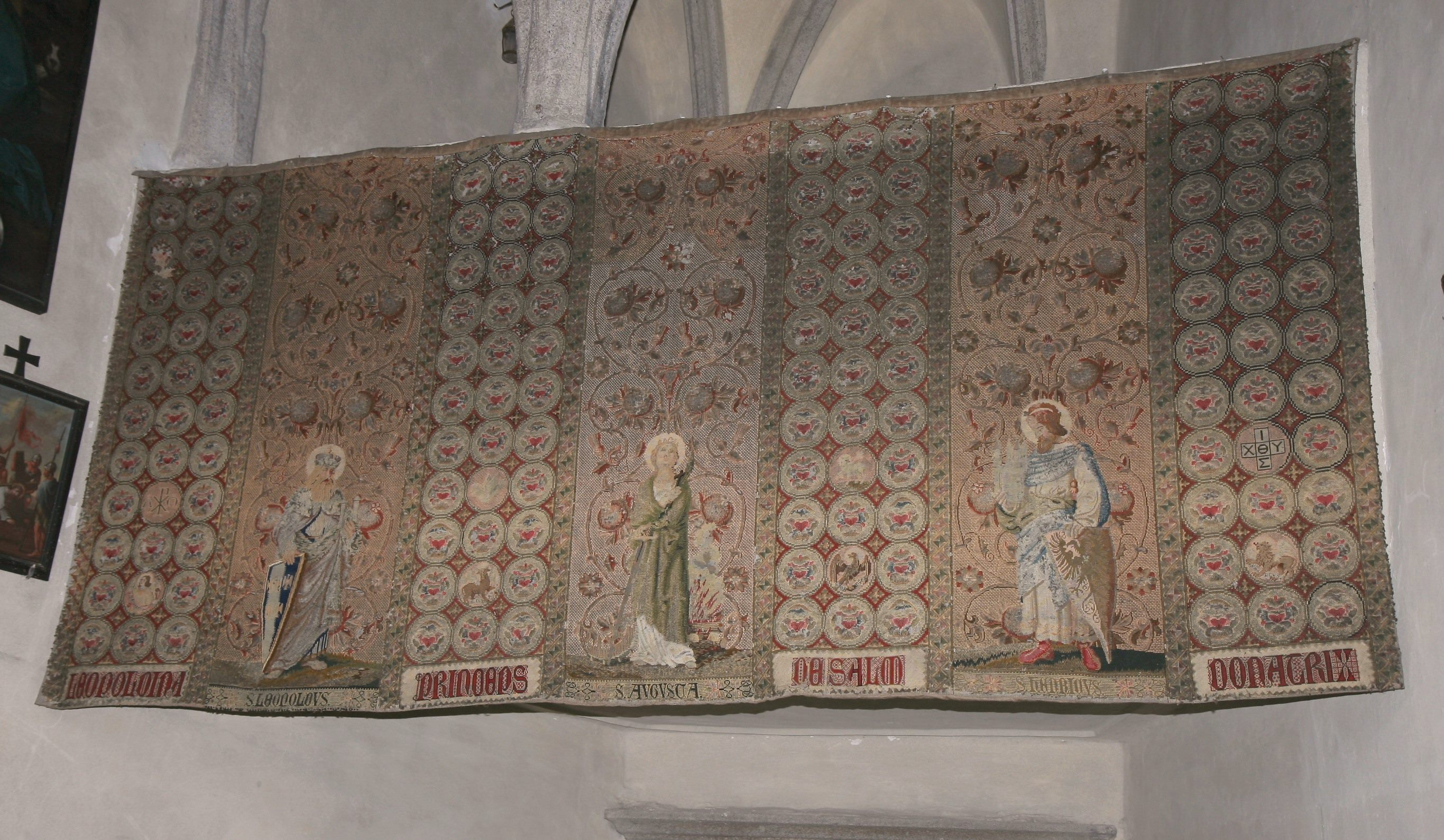 Gobelin an der Emporenbrüstung der Kapelle aus dem 15. Jahrhundert der Burg Clam in Klam im Bezirk Perg in Oberösterreich.